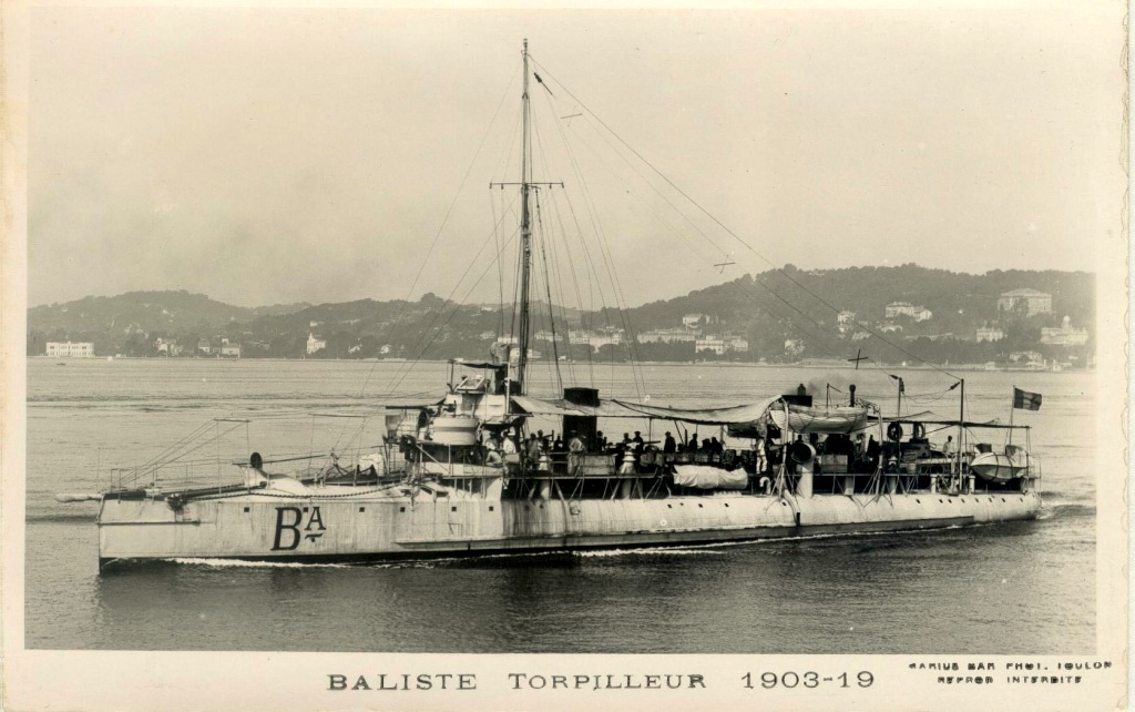 Contre-torpilleur français : Baliste (Classe Arquebuse)